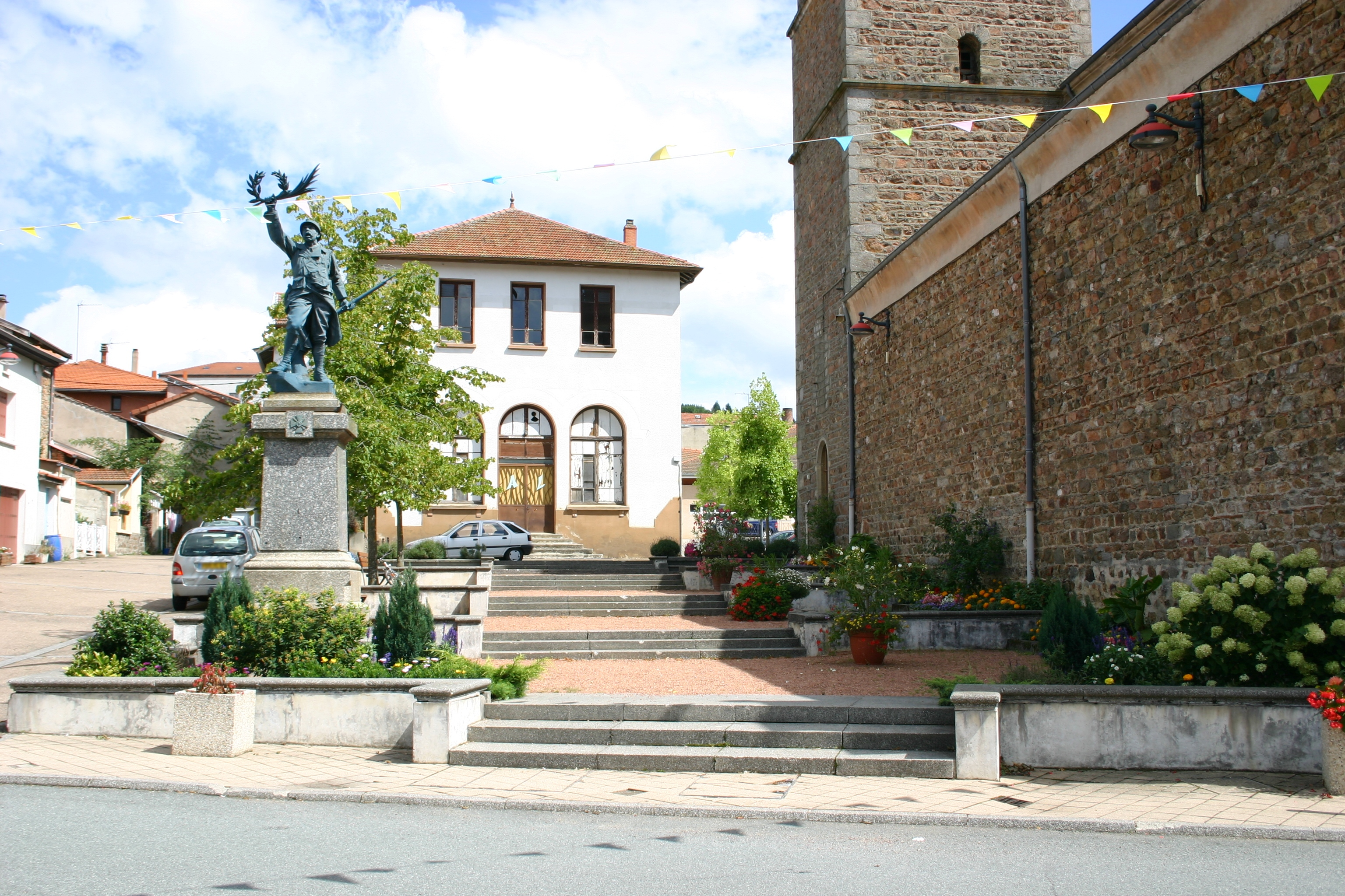 Monument aux morts de Bussières dans le département de la Loire.